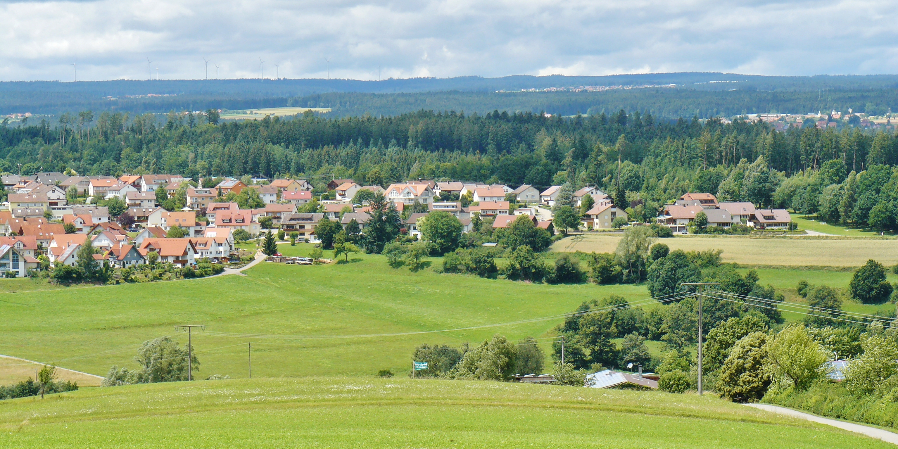 Ausblick vom Egenhäuser Kapf Richtung Westen